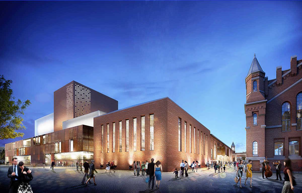 "Kulturkraftwerk" Dresden-Mitte, Architekturvisualisierung